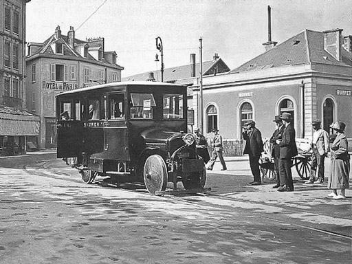 Saurer Schienenbus in Bourg-d’Oisans.